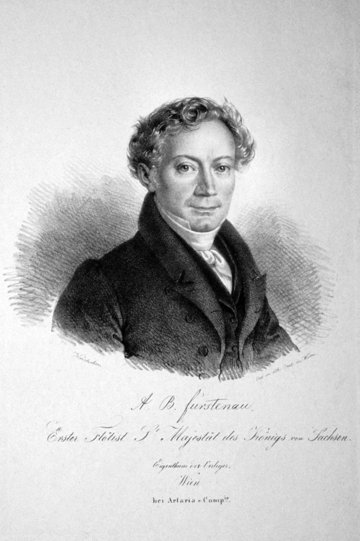 Litographic portrait of German flutist Anton Bernhard Fürstenau (1792-1852)label QS:Len,"Litographic portrait of German flutist Anton Bernhard Fürstenau (1792-1852)" label QS:Lde,"Anton Bernhard Fürstenau"